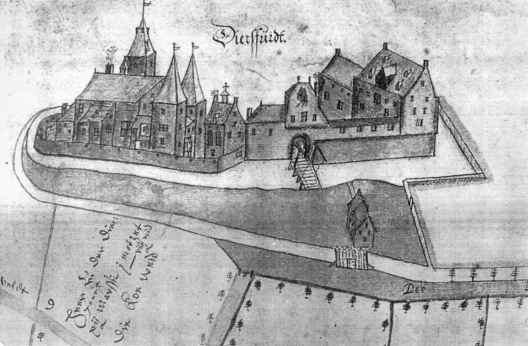 Zeichnung des Schlosses Diersfordt zu Beginn des 17. Jahrhunderts